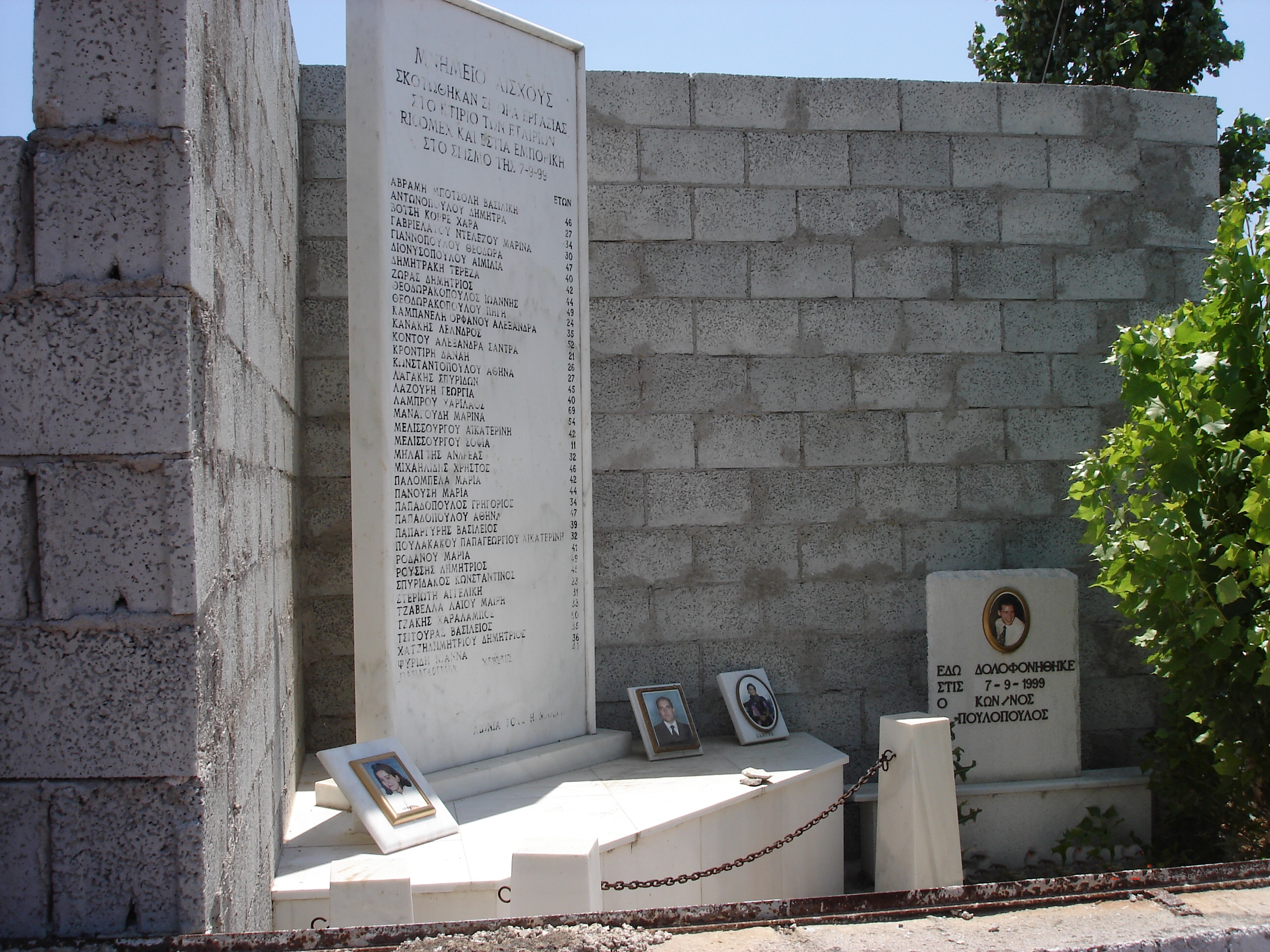 Εργοστάσιο Ρικομεξ, Μενίδι σεισμός Πάρνηθας το 1999